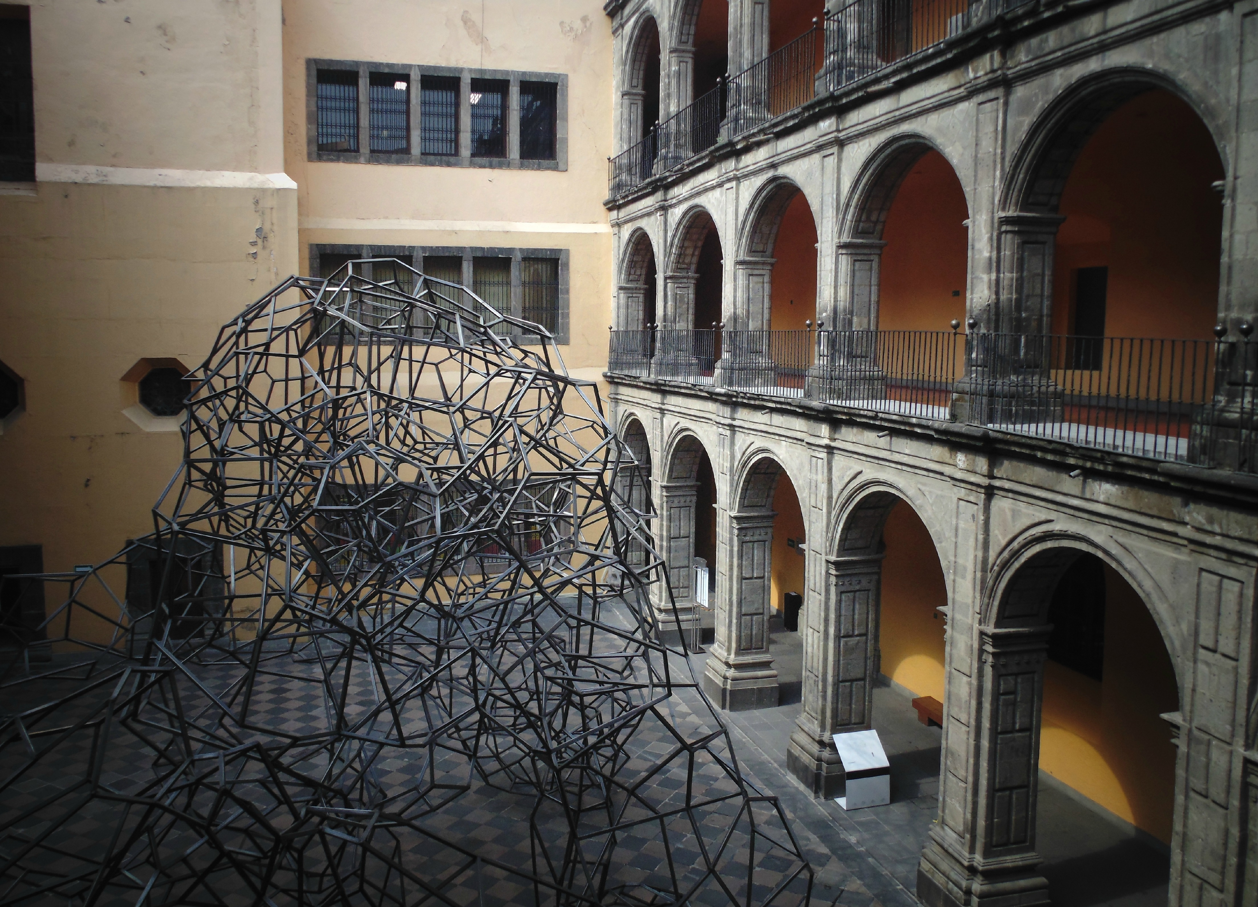 Vista al Colegio de San Ildefonso.